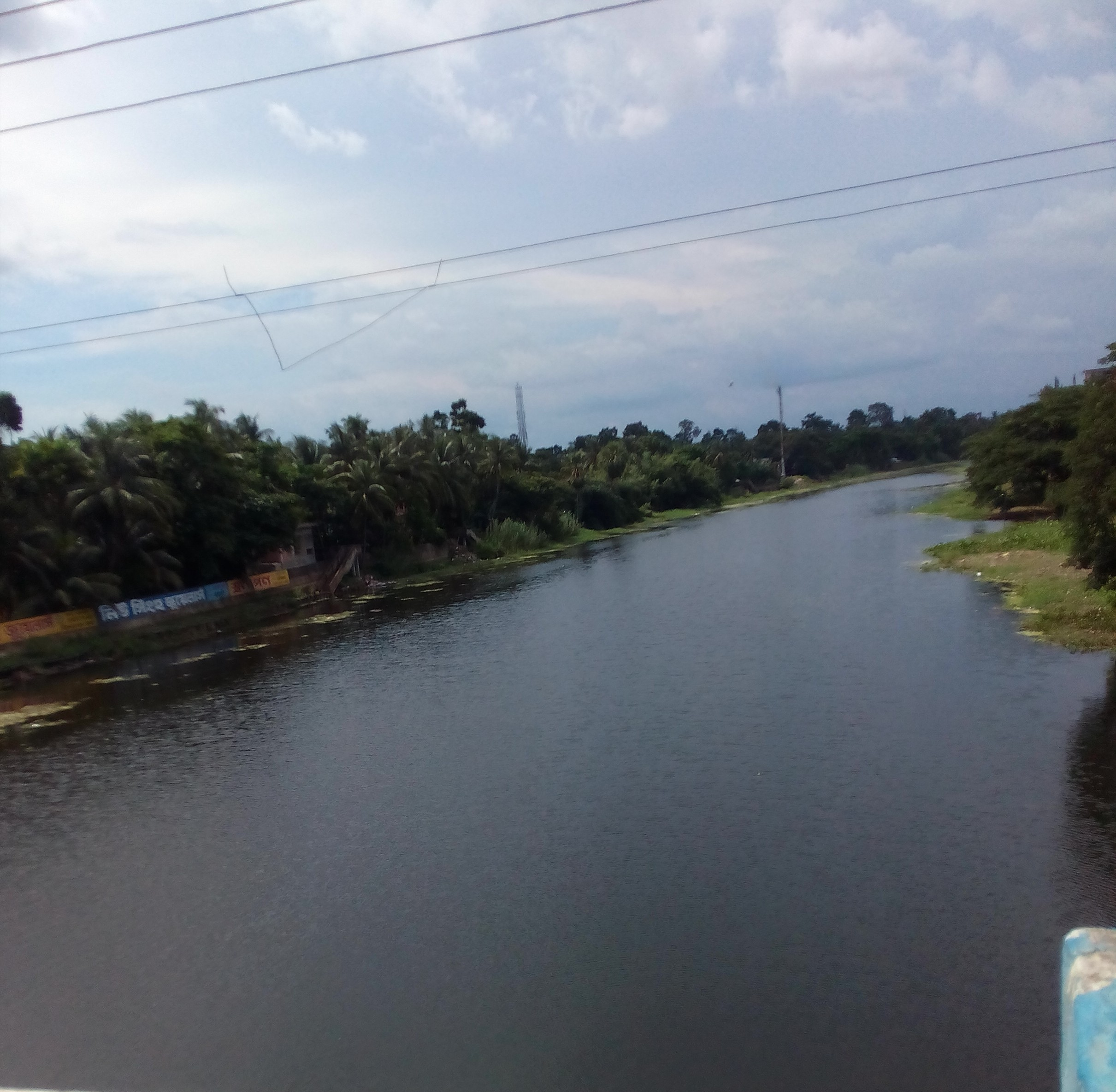 Ichamati river at Bongaon